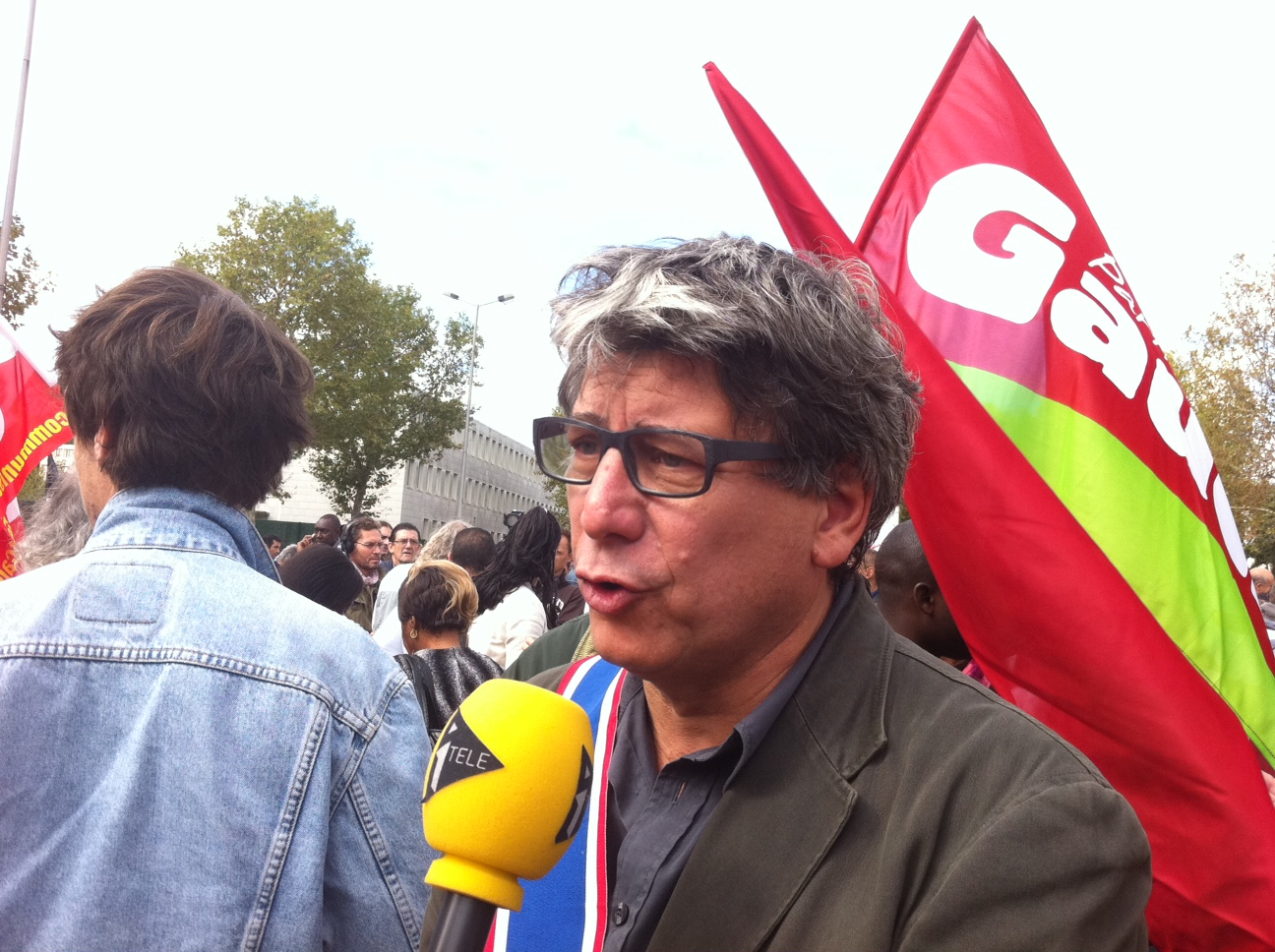 Éric Coquerel dirigeant du Parti de gauche lors d'une manifestation le 29 septembre 2012 à Aulnay-sous-Bois.